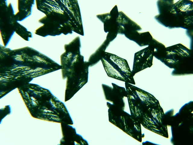 Krystaly bílé třaskavé rtuti